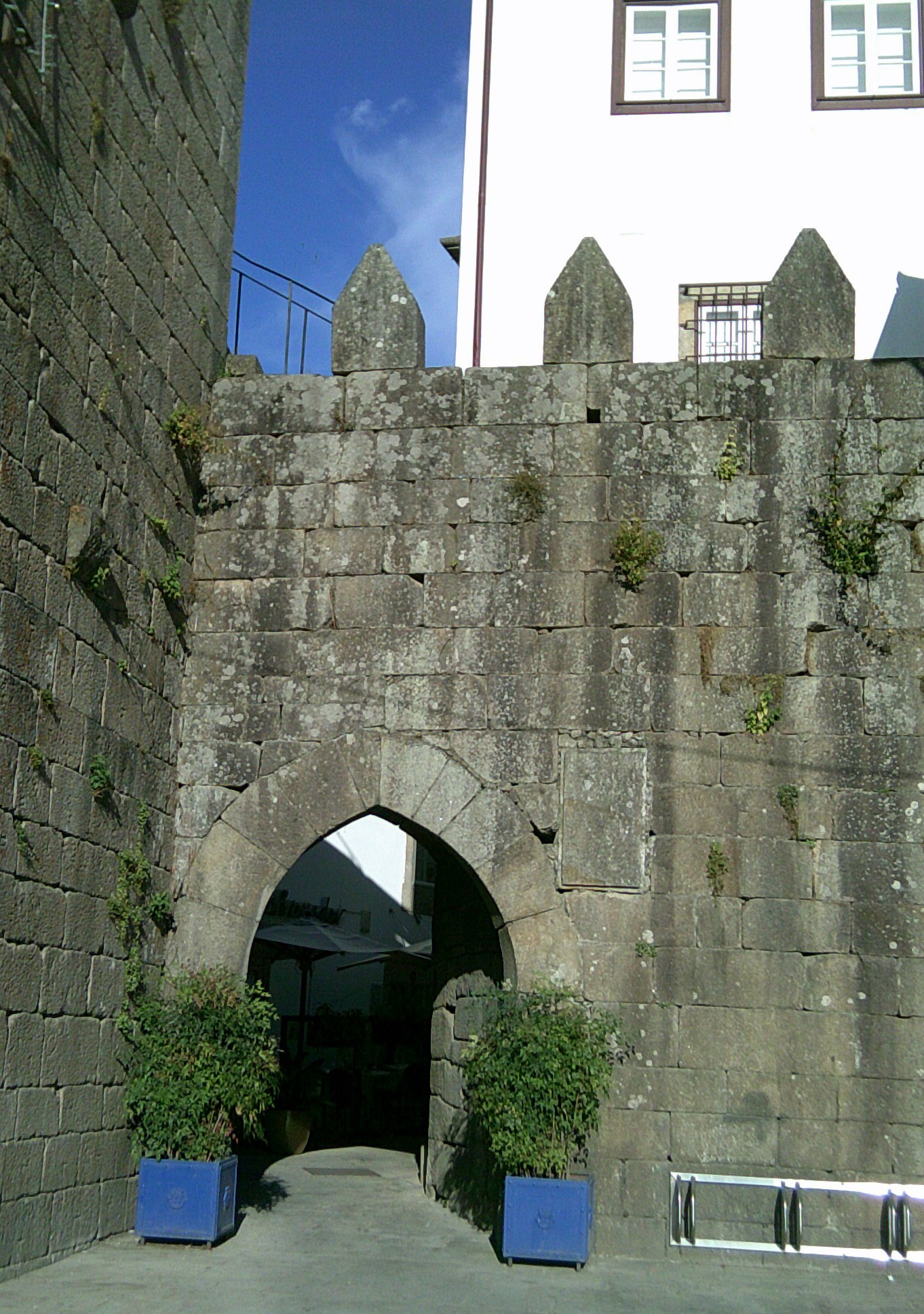 Arco da Porta Nova, freguesia de Ponte de Lima, vila e concelho de mesmo nome, distrito de Viana do Castelo, Portugal.